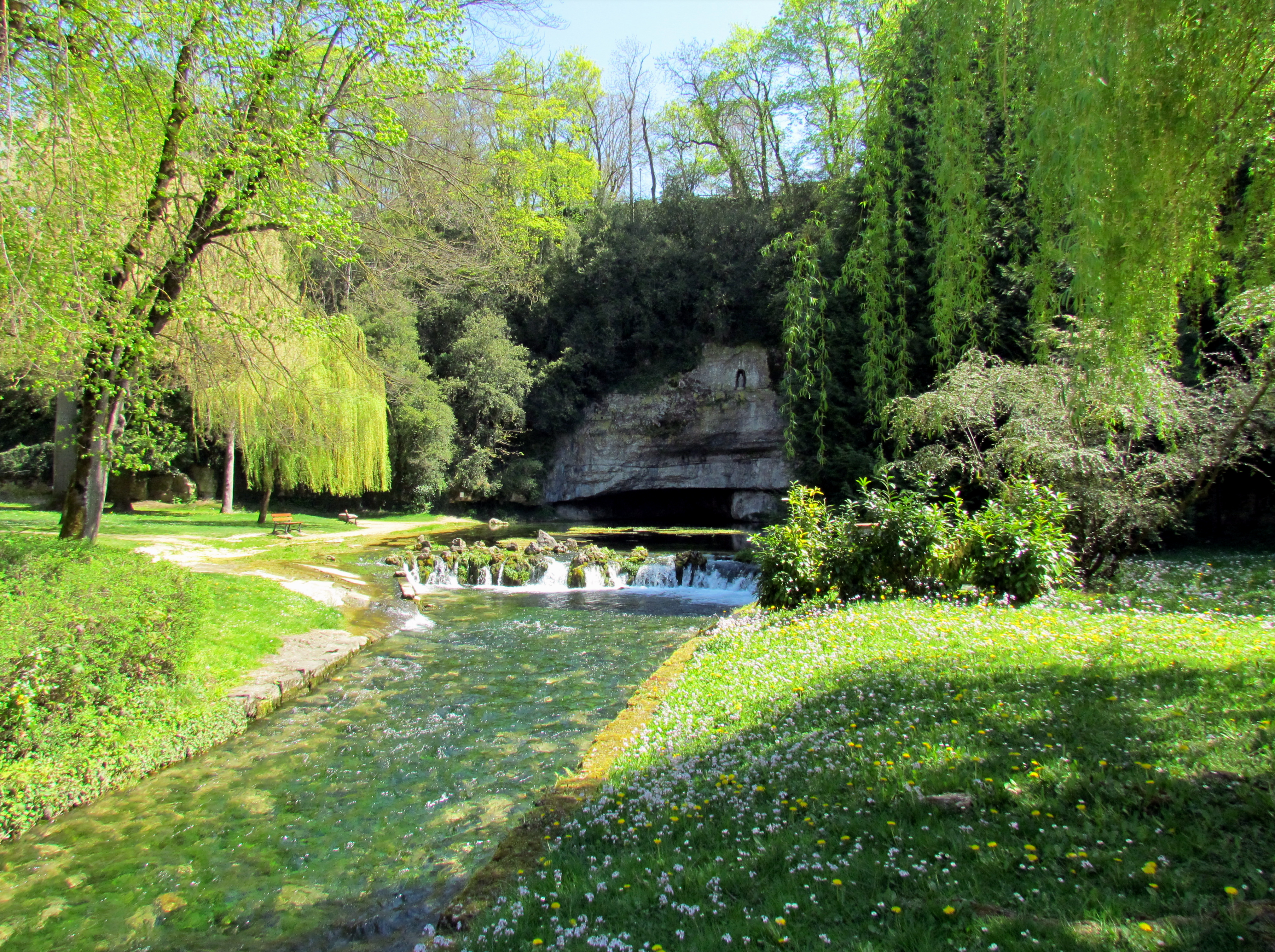 Source de la Douix # Châtillon-sur-Seine (21) .